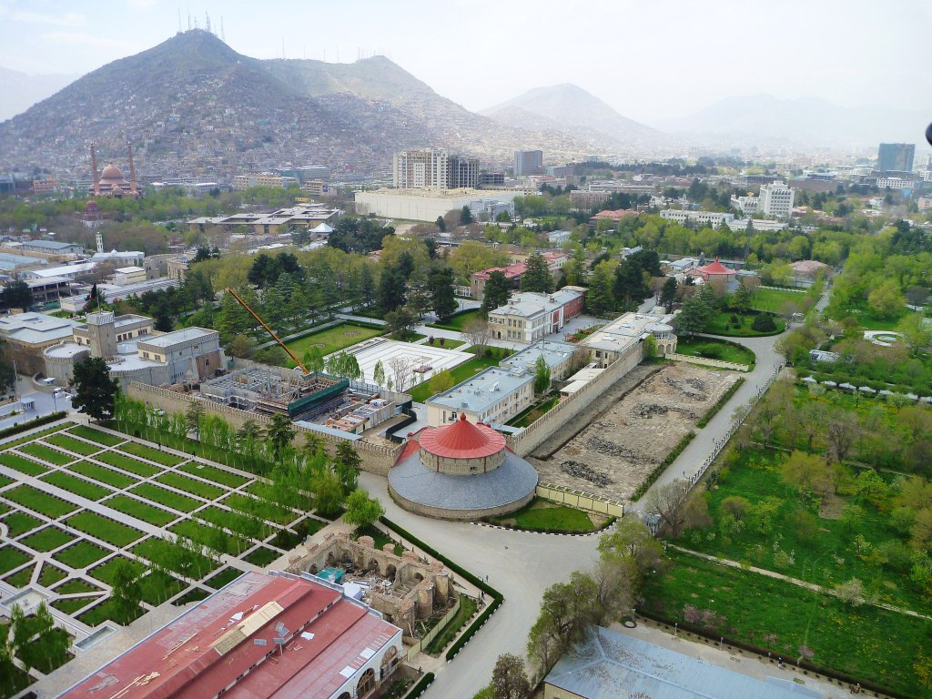 Presidential Palace